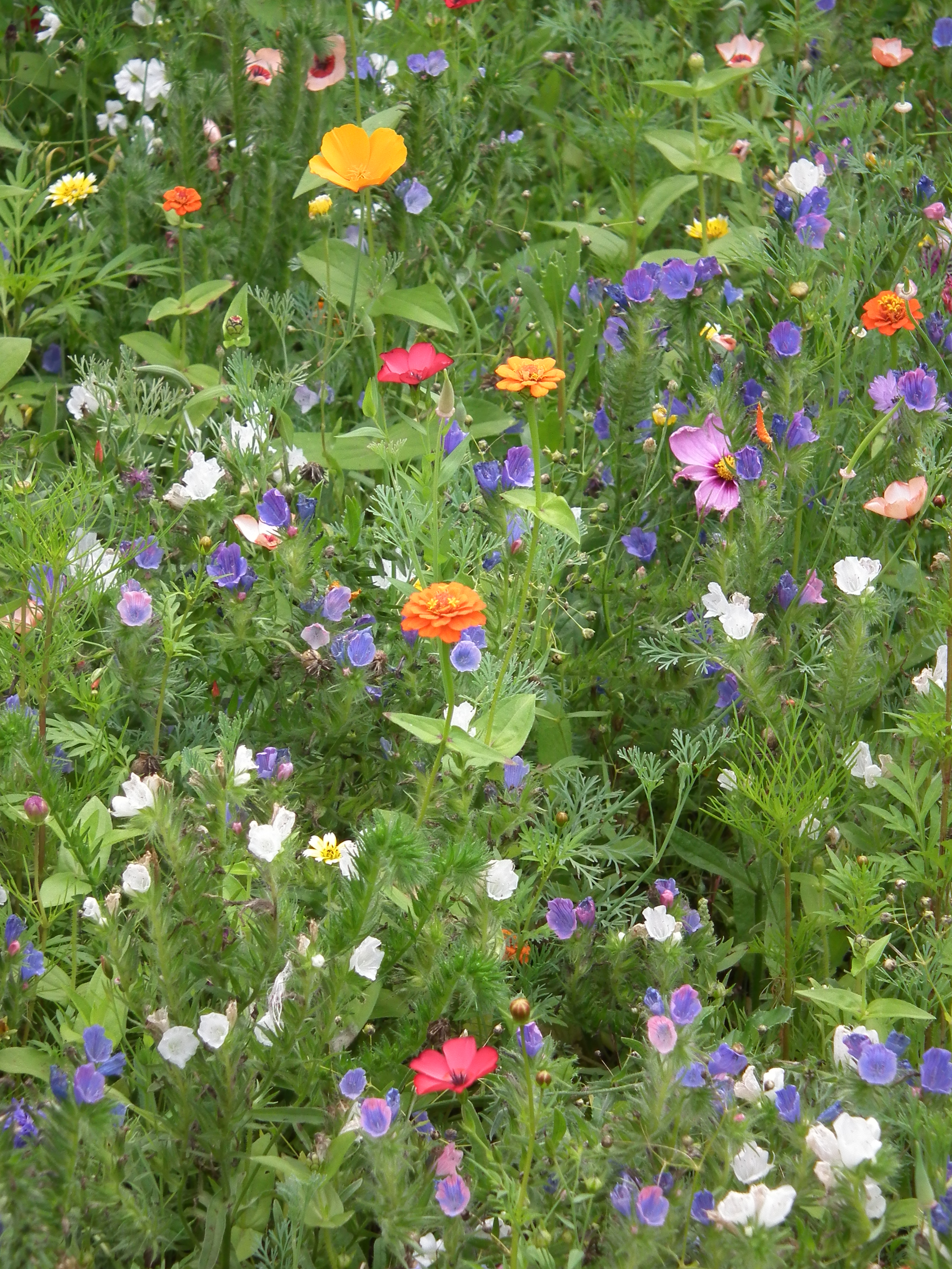 Bunte Blumenwiese, fotografiert in Heidelberg (Baden-Württemberg, Deutschland)